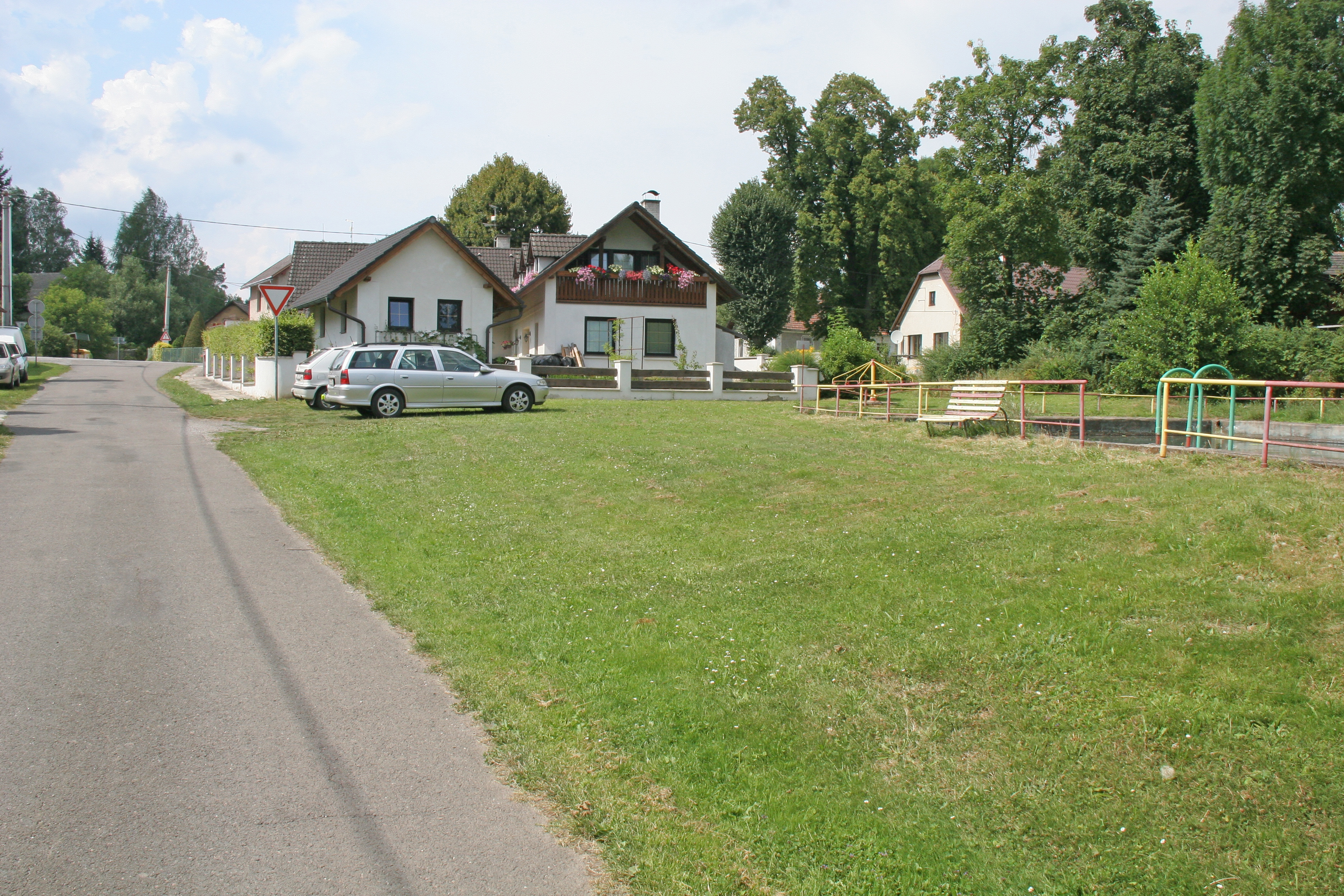 Trotina čp. 39